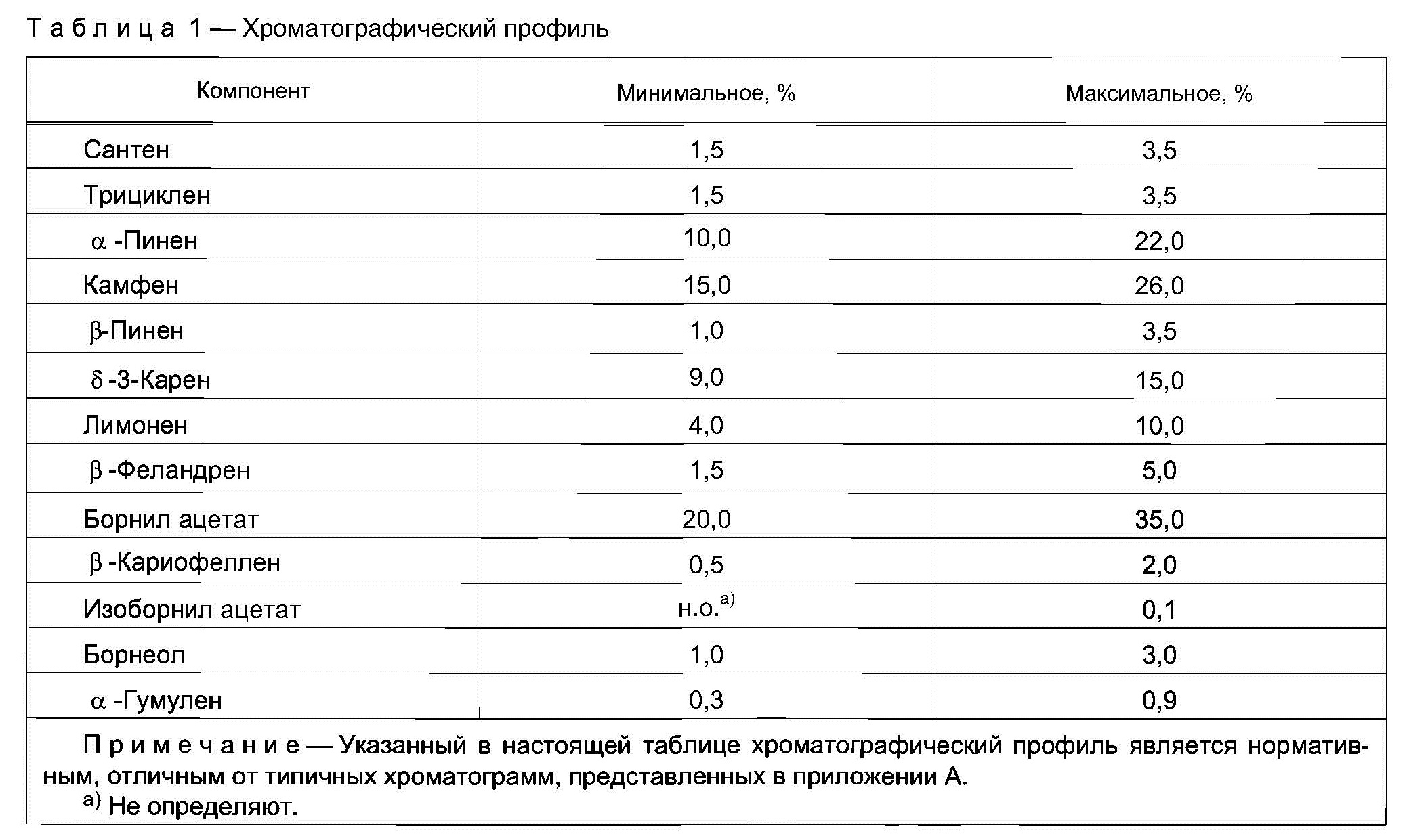 Выдержка из ГОСТ